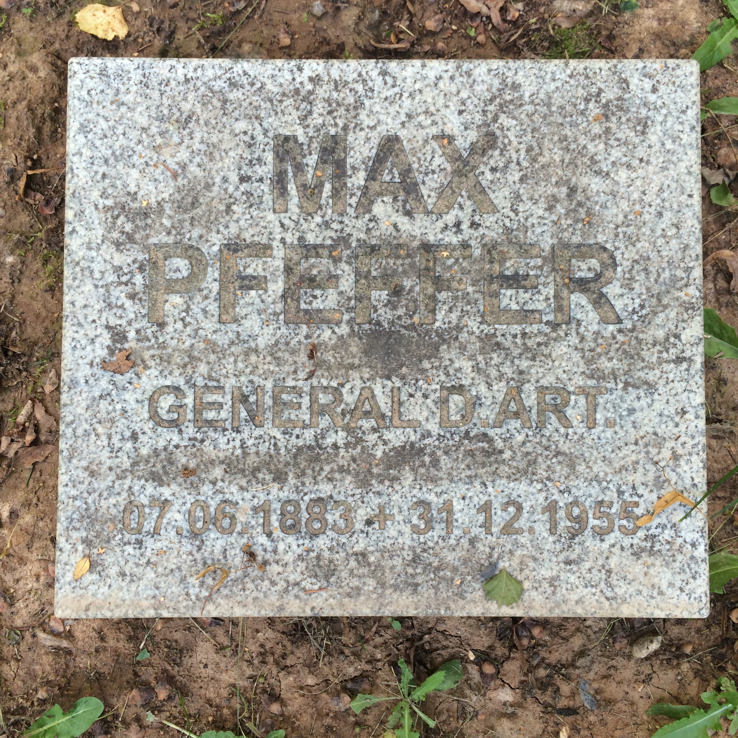 Tombstone; Cherntsy Memorial